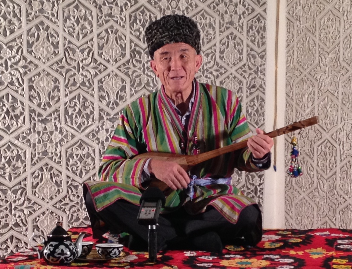 Абдуназар Поёнов исполняет на домбре эпос "Келиной"